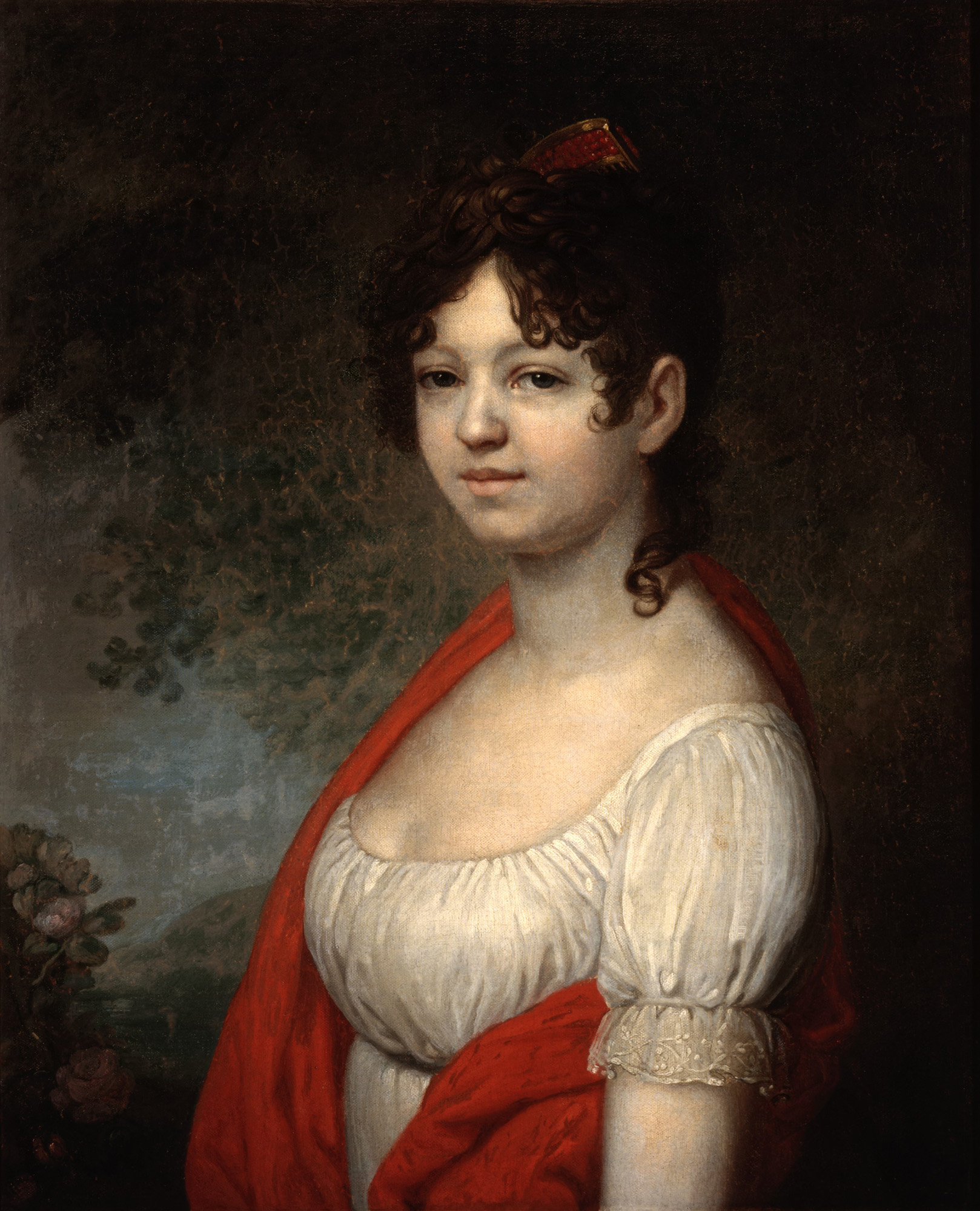 Варвара Андреевна Томилова (1784–1823) – дочь полковника Андрея Петровича Мельгунова (1741-1792) и Екатерины Алексеевны Барыковой (1757-1820). С 1803 г. – жена А.Р.Томилова (1779–1848), генерал-майора, участника войны 1812 г., коллекционера, мецената, знатока русской истории и истории искусства.